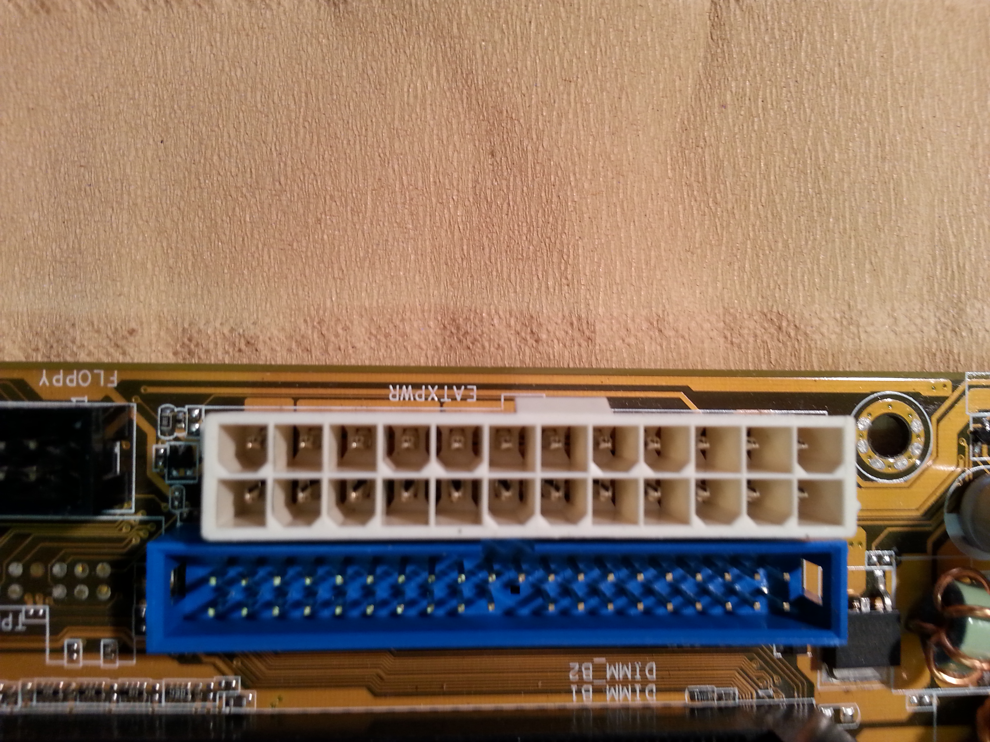 Connecteur IDE (bleu) surmonté d'un connecteur ATX 24 pins (blanc)